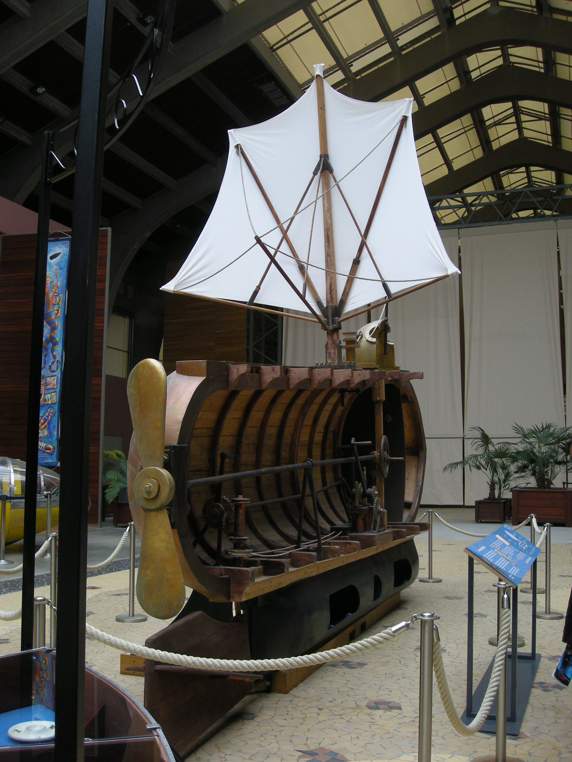 Reconstitution en coupe du Nautilus (1799) de Robert Fulton, à la Cité de la Mer (Cherbourg, Normandie)